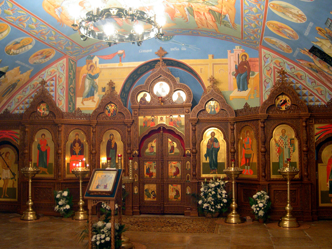 Иконостас пещерной церкви Черниговского скита